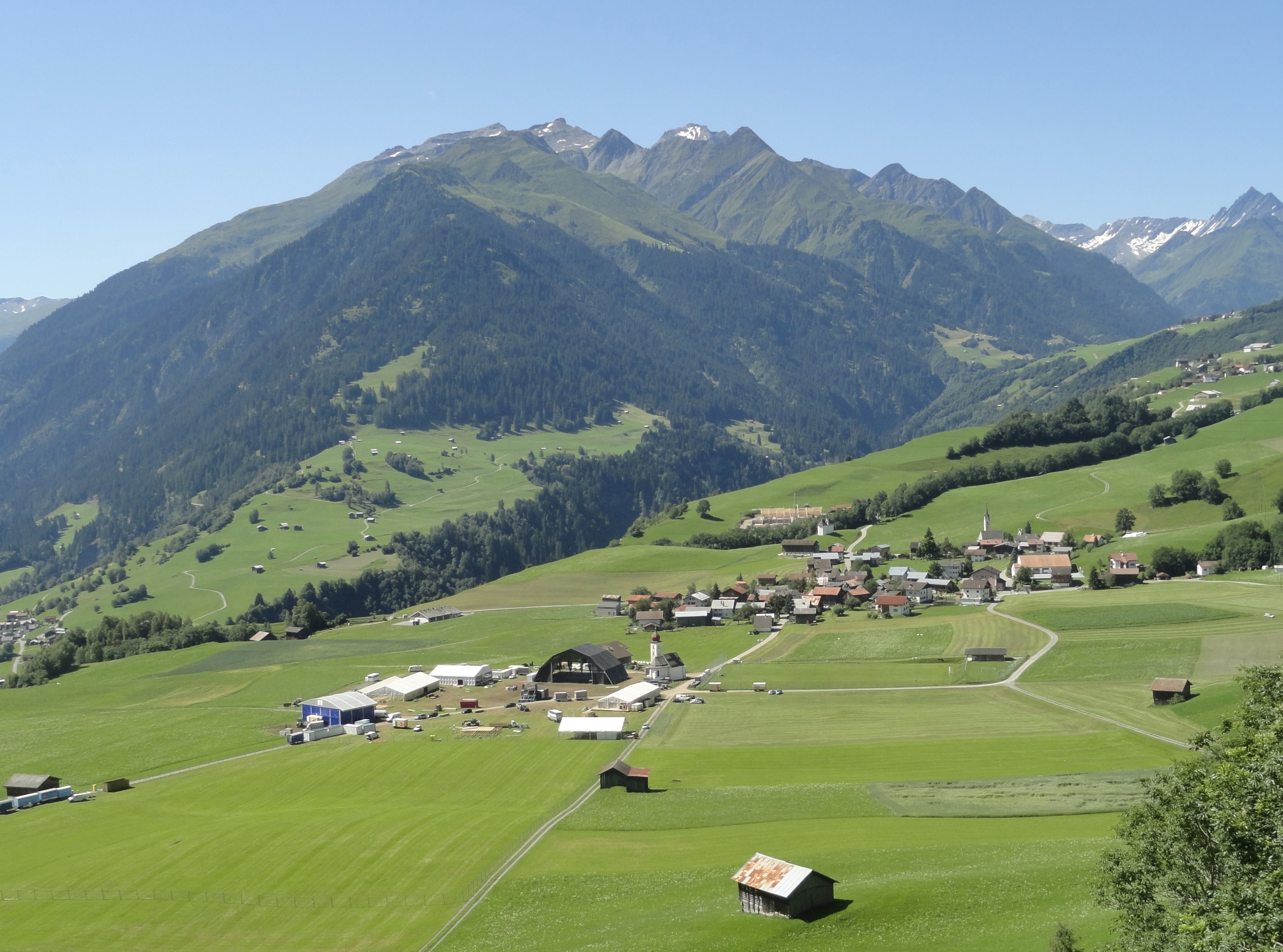 Degen GR